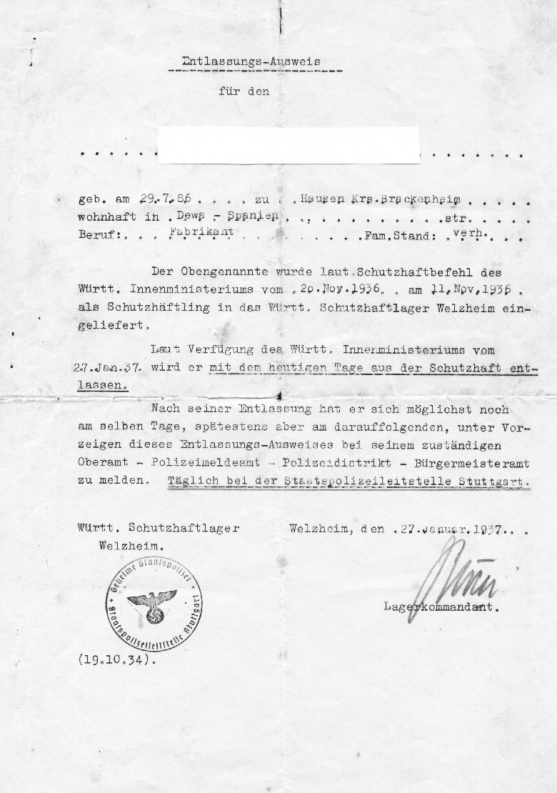 Entlassungs-Ausweiss eines Häftlings des Württembergisches Schuttzhaftlager Welzheim